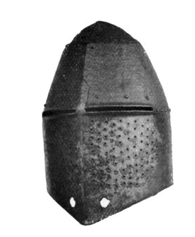 The helm of Richard Pembridge from Hereford Cathedral